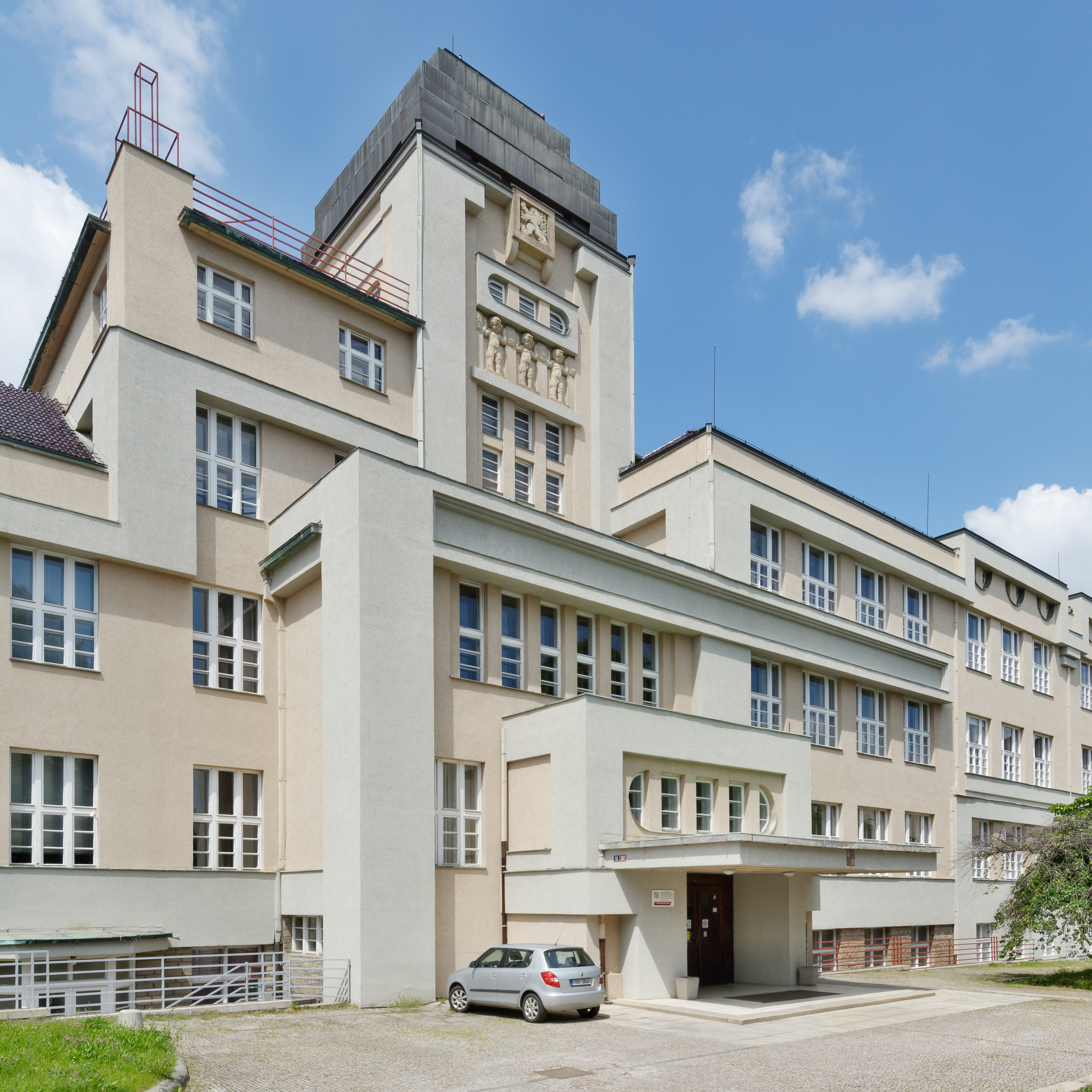 Zemská průmyslová škola (Později Střední průmyslová škola, dnes Vyšší odborná škola, Střední průmyslová škola a Jazyková škola s právem státní jazykové zkoušky), Kutná Hora – Hlouška, čp. 197, Masarykova 1 / Školní 13. Hlavní vchod, věž, učební křídlo.